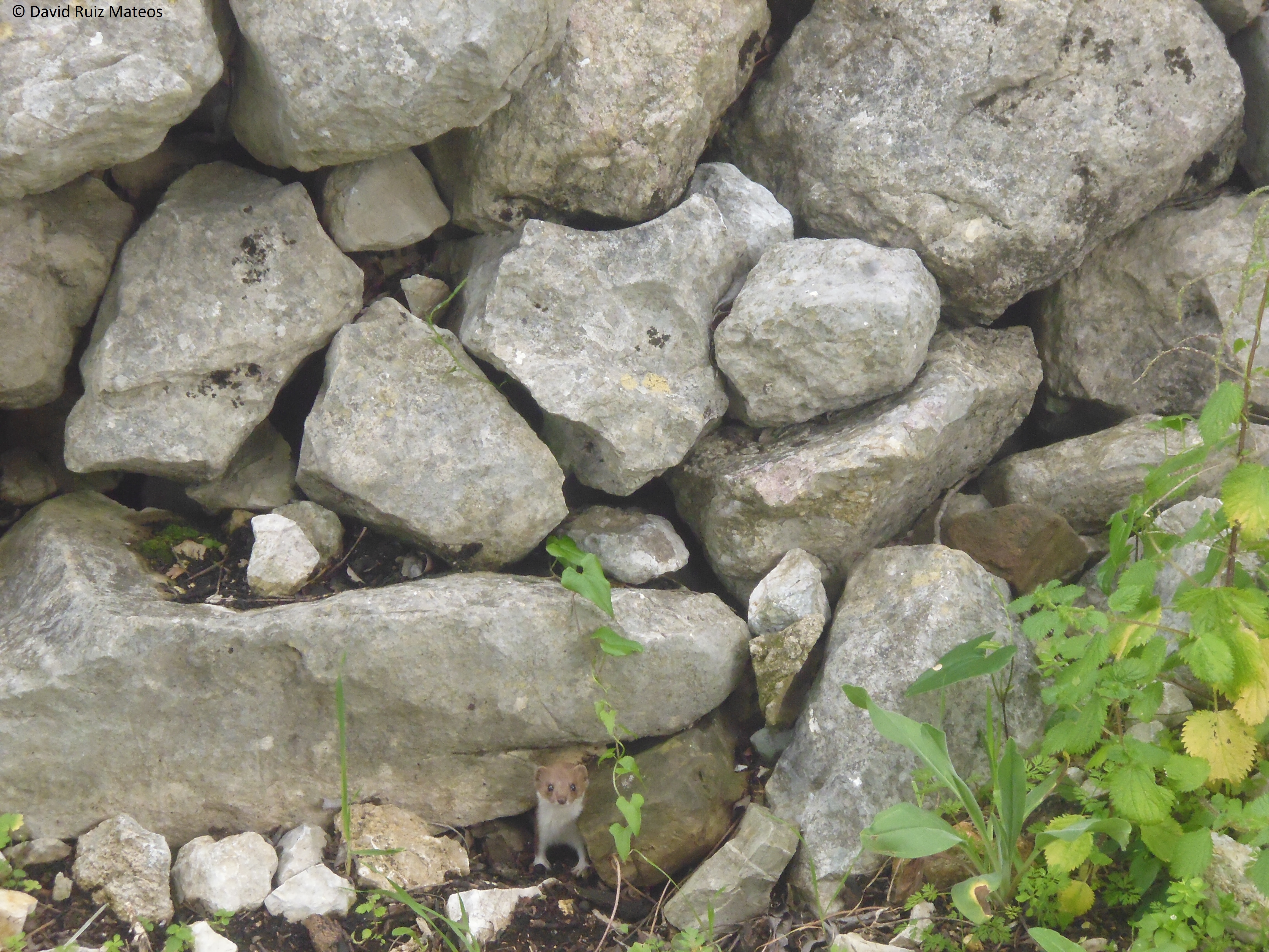 Comadreja en el Parque Natural Sierra de Grazalema This is an image of the Biosphere Reserve or a Geopark: Sierra de Grazalema Natural Park